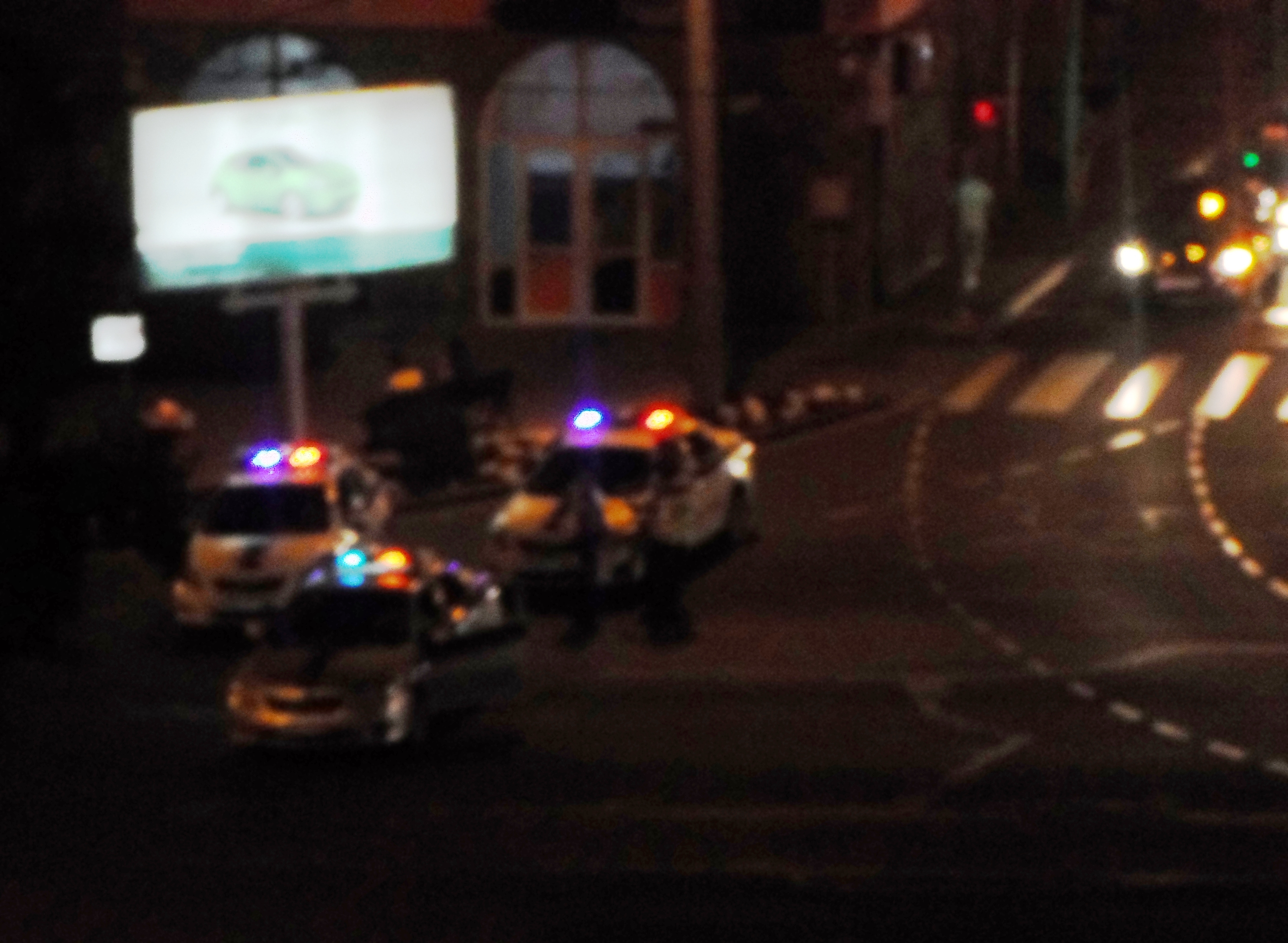 Բաղրամյան պողոտան՝ ընդդեմ հոսանքի թանկացման ցույցի մասնակիցների հանդեպ զանգվածային բռնություններից ժամեր առաջ, հունիսի 22